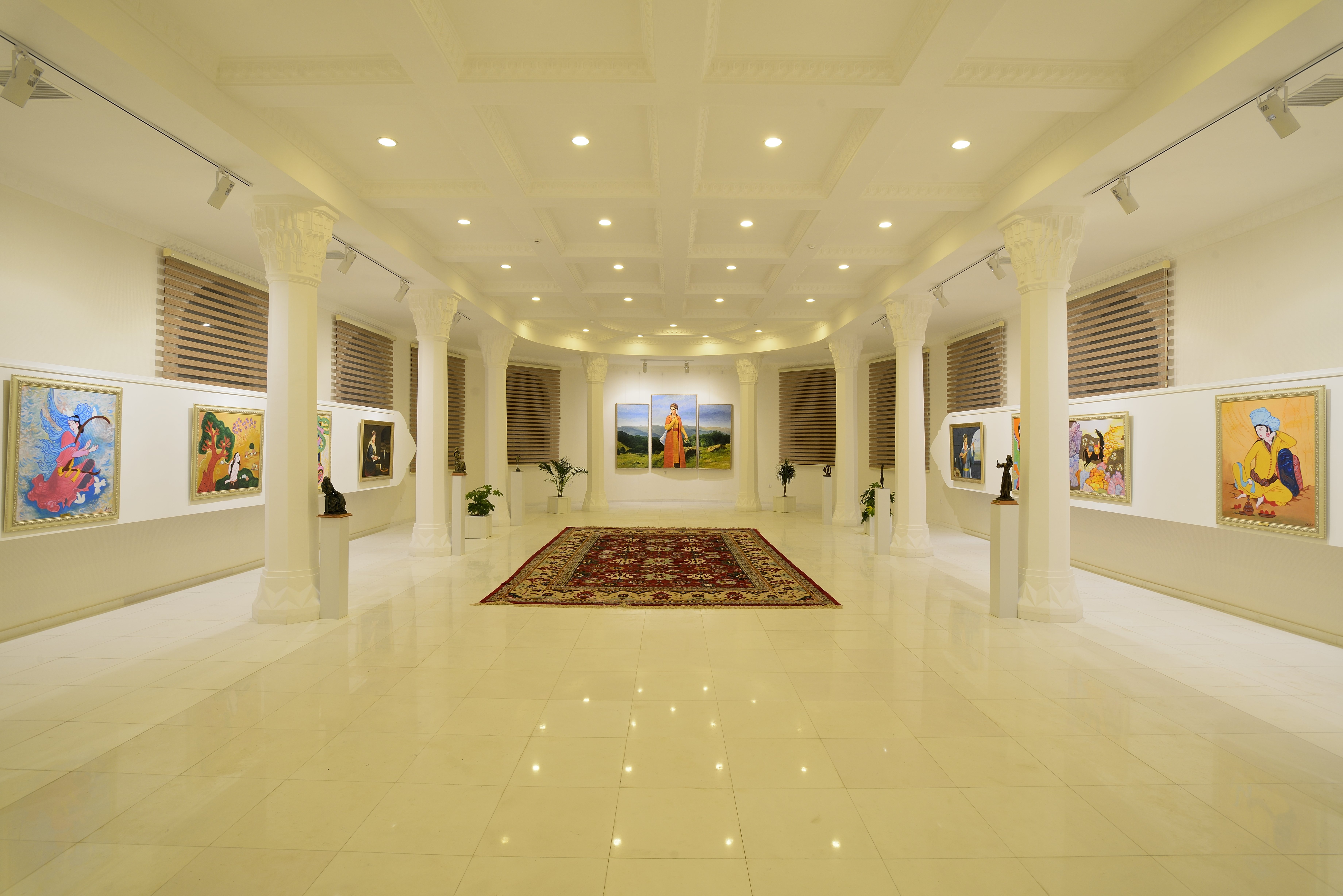 Gəncədə Məhsəti Gəncəvi Mərkəzi